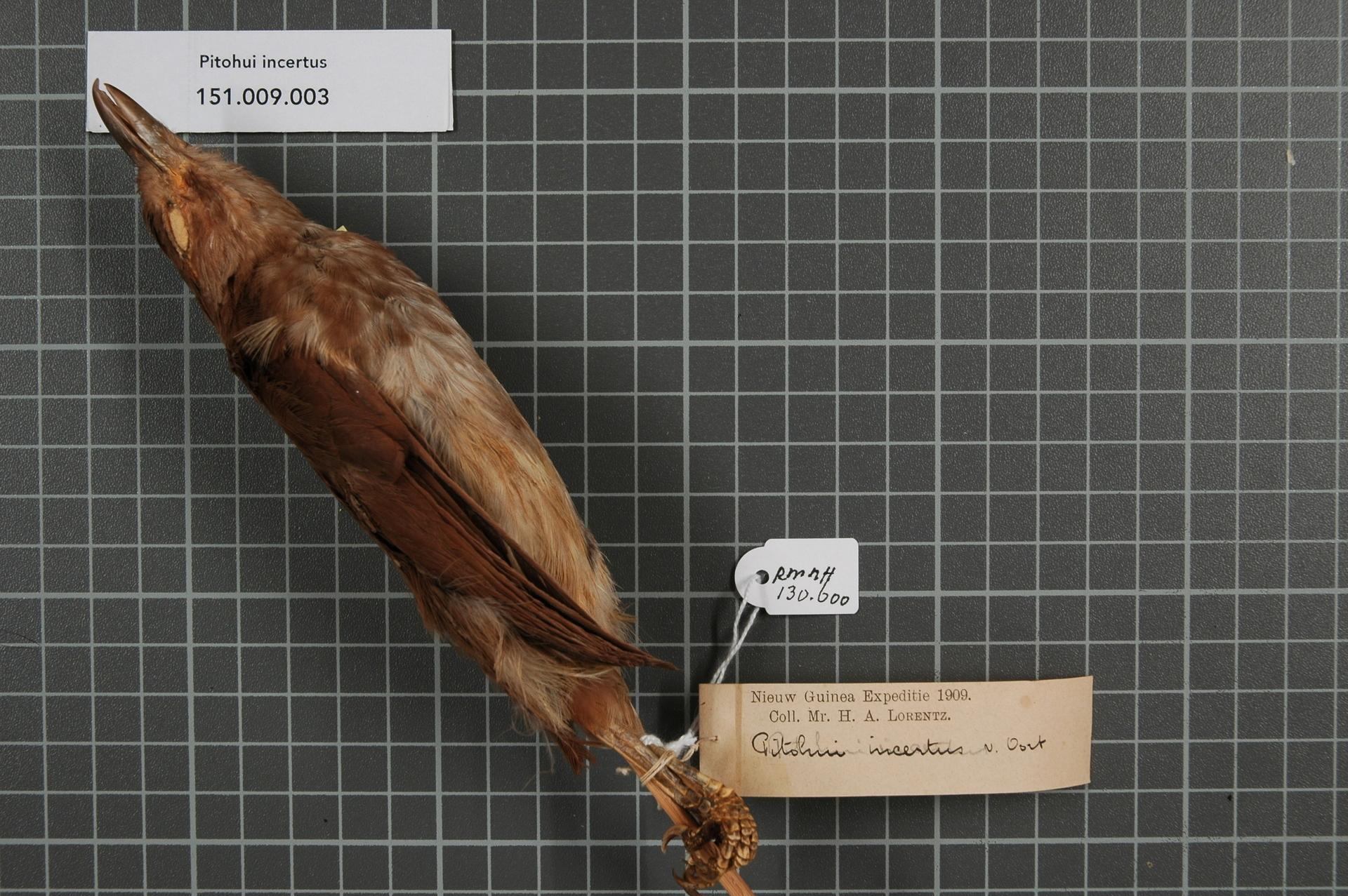 Pitohui incertus van Oort, 1909